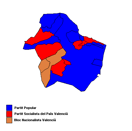 Partits polítics més votats als municipis del Camp de Morvedre (País Valencià) després de les eleccions municipals de 2007.